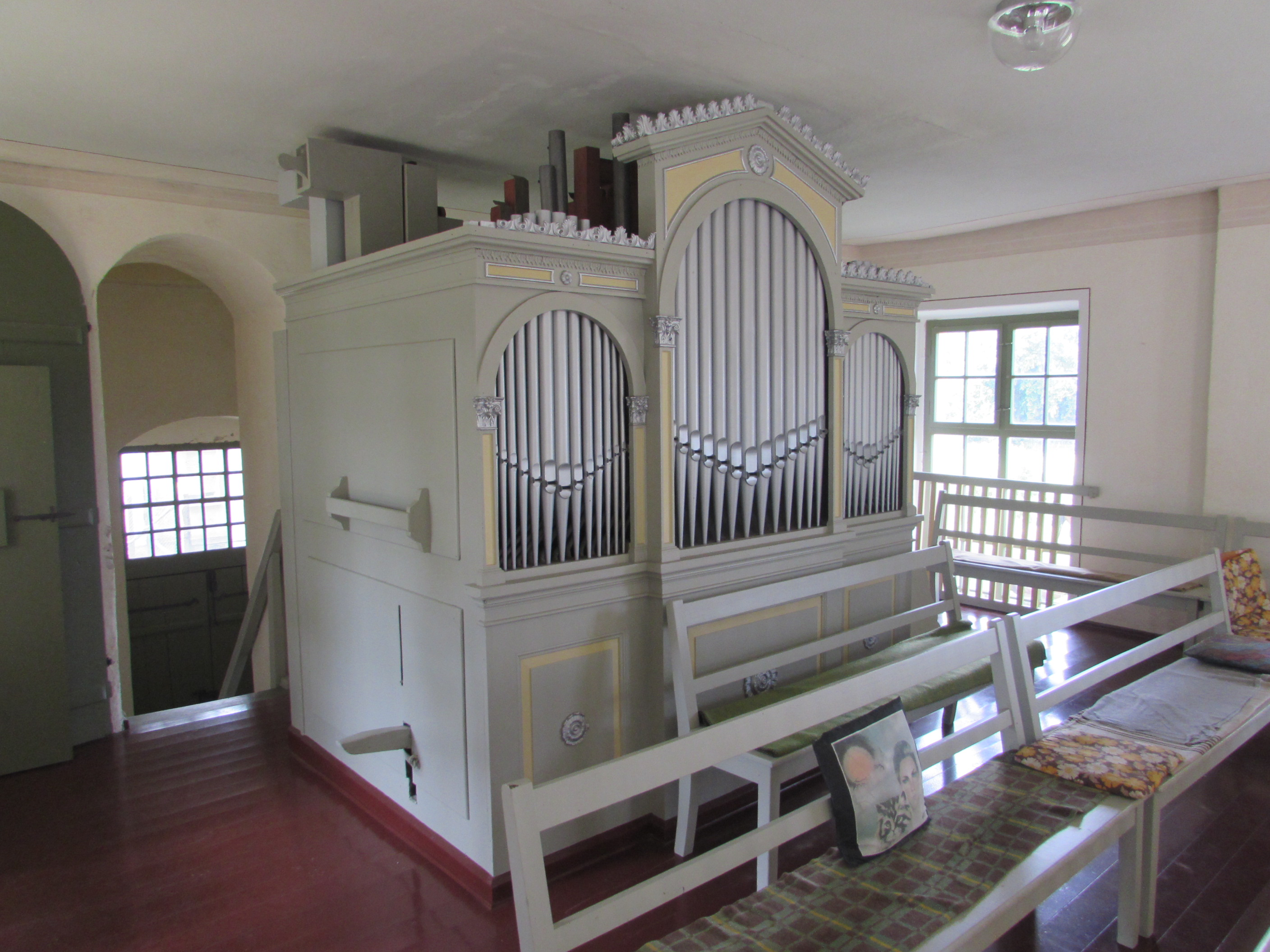 orgel dorfkirche altbensdorf